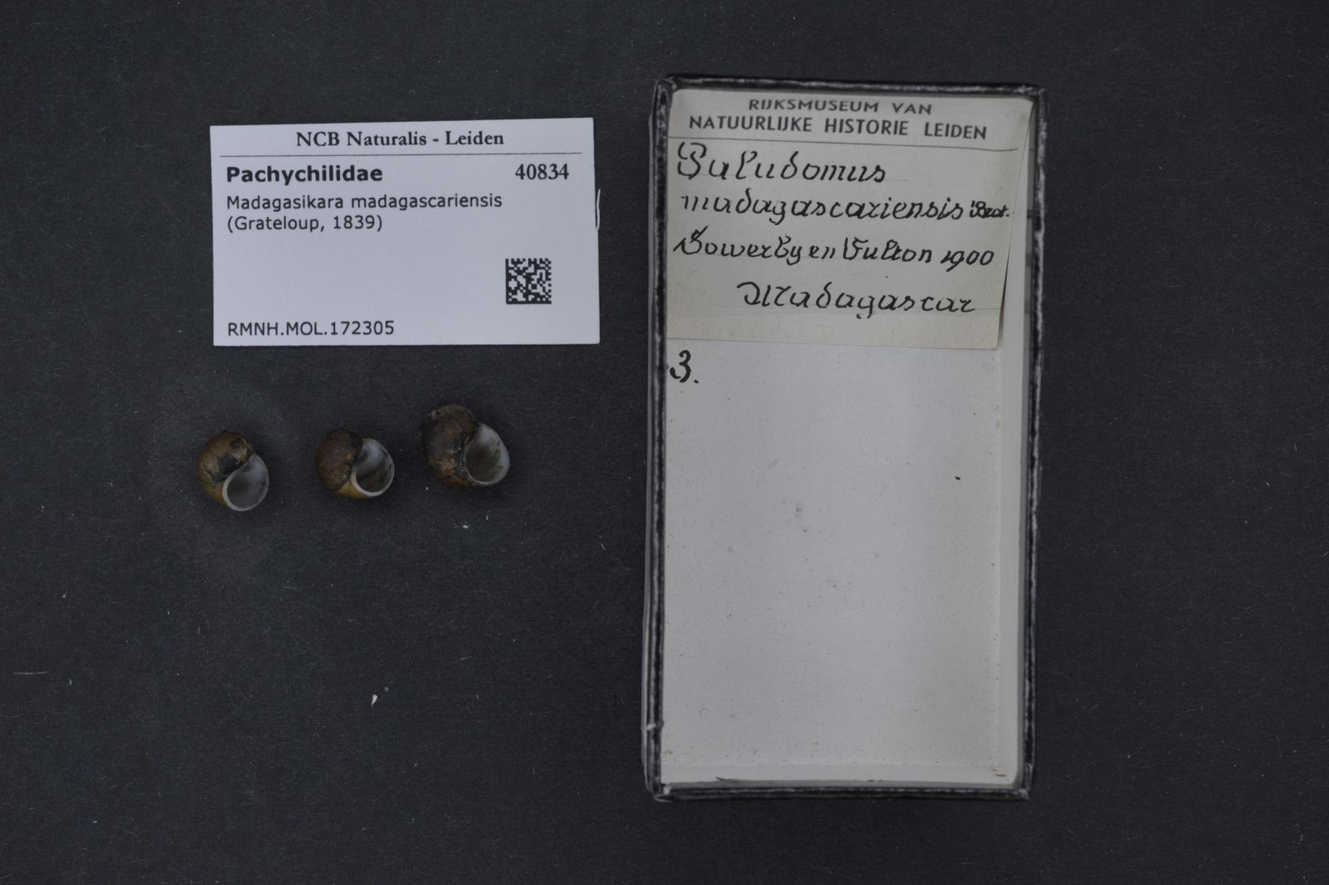 Madagasikara madagascariensis (Grateloup, 1839)